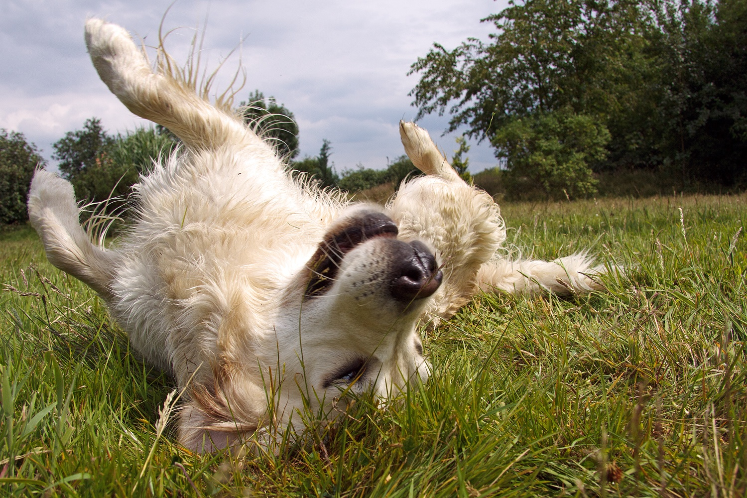 Deutscher Retriever Club, Bezirksgruppe Kamen, Übungsgelände Heeren-Werve, Datum/Uhrzeit: 10.07.2011 14:56:00